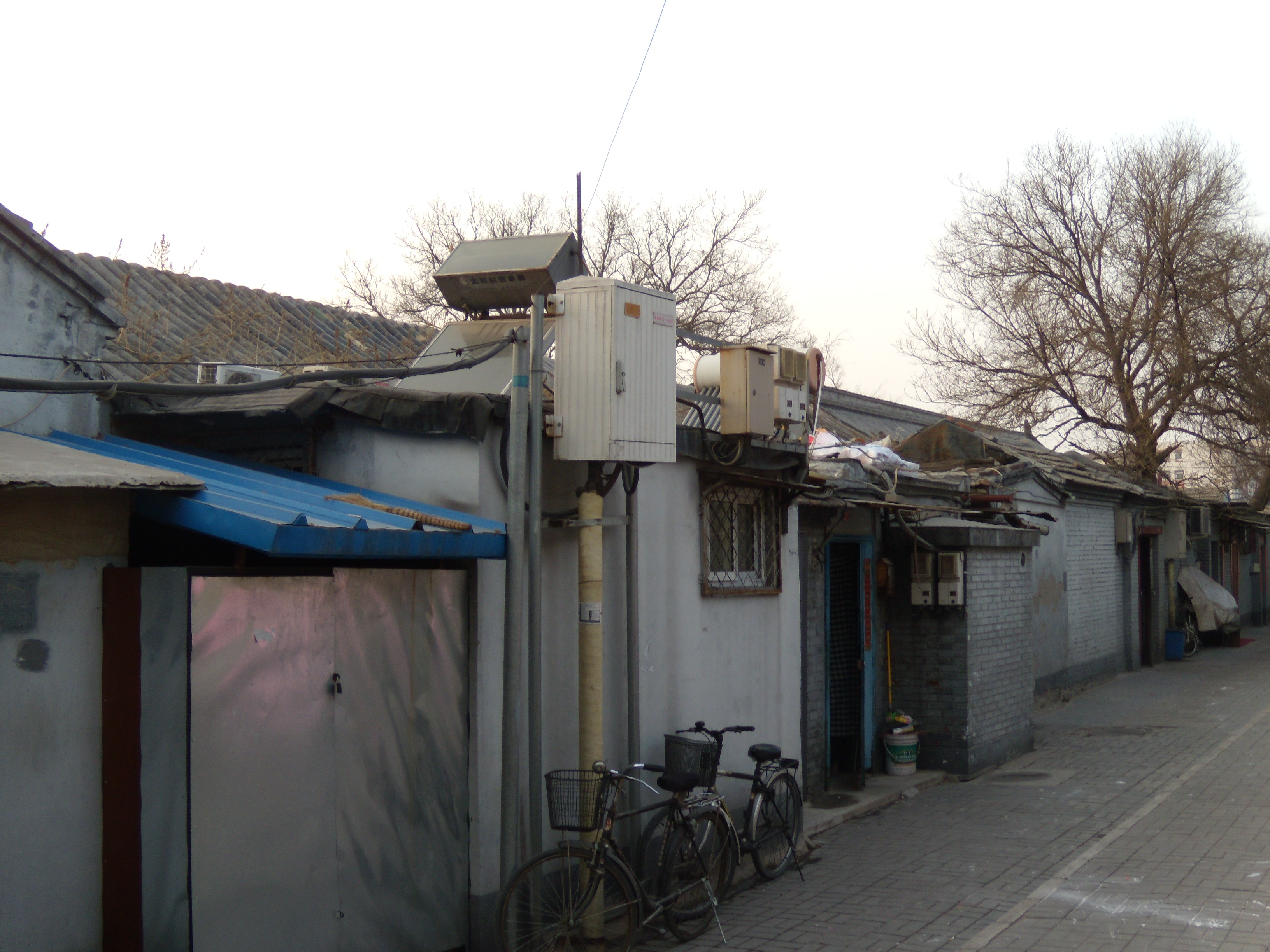 北京护国寺